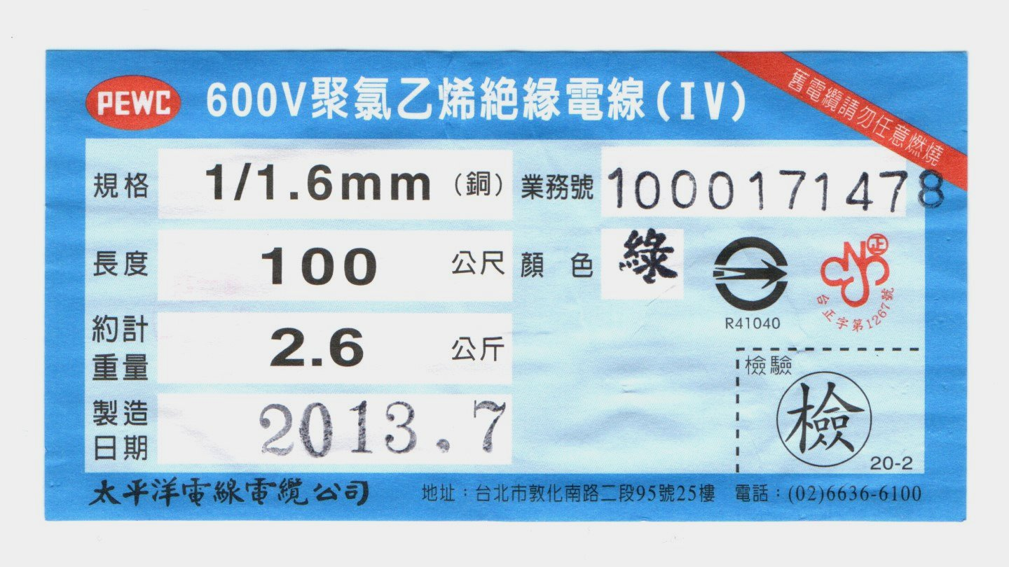 中文（台灣）: 太平洋電線電纜公司600V聚氯乙烯絕緣電線規格標籤，製造日期為2013年7月。